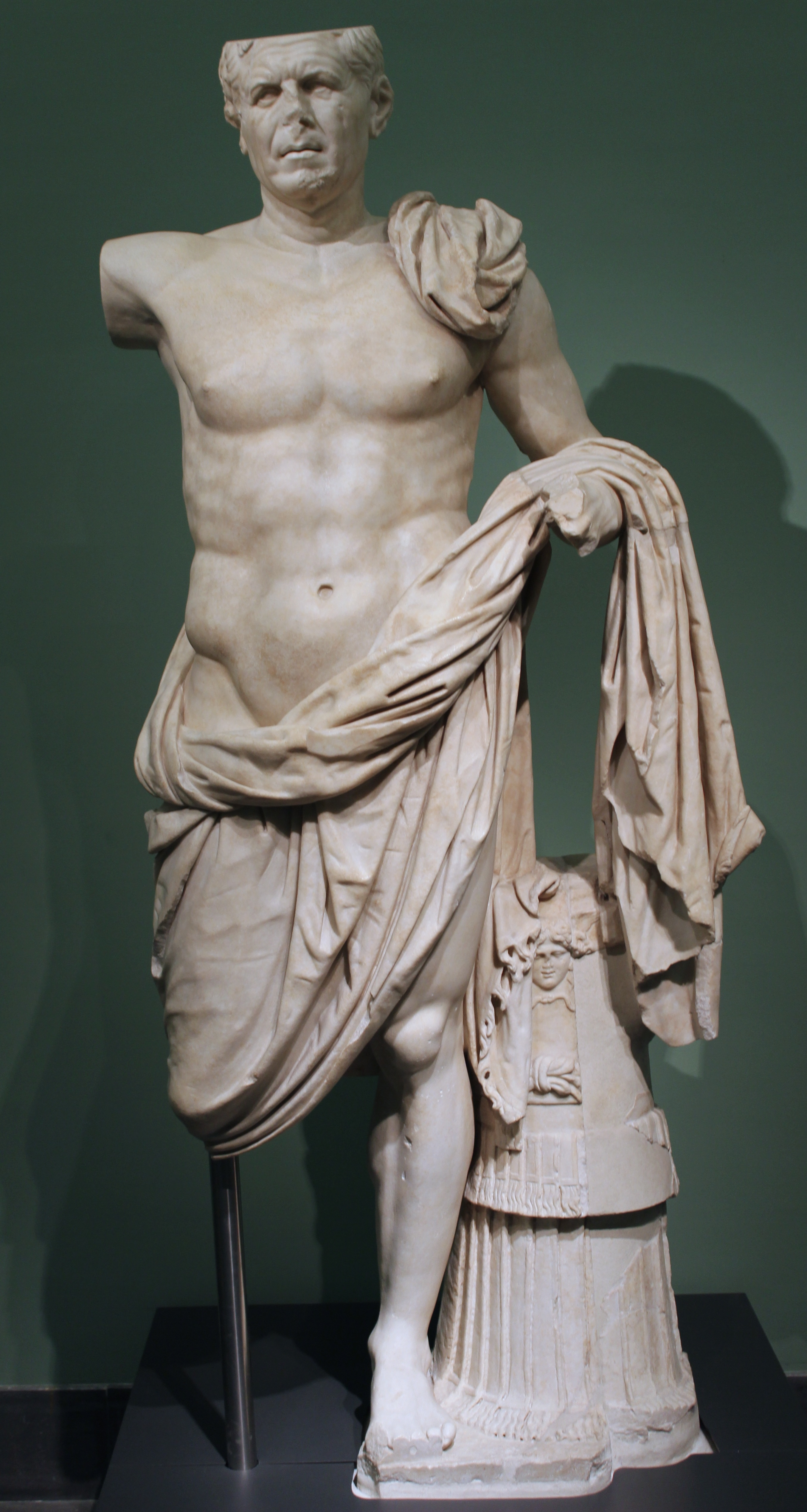 Roma, Palazzo Massimo alle Terme. General de Tivoli.